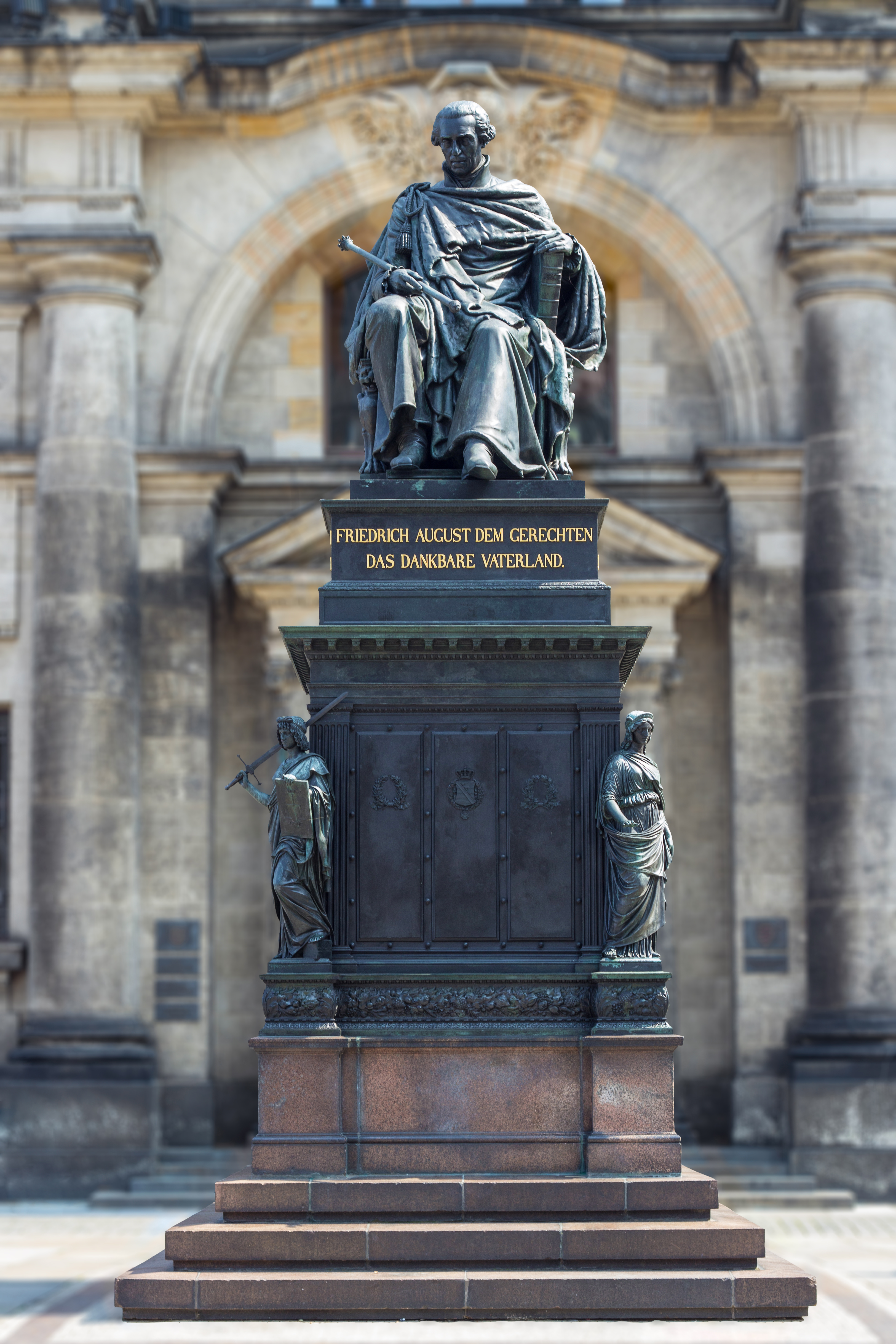 Friedrich-August-Denkmal in Dresden, welches 2008 an der Stelle des ehemaligen König-Albert-Denkmals (eingeschmolzen nach 1945) errichtet wurde und sich vor dem Georgenbau befindet. Das Denkmal (geschaffen von Ernst Rietschel), wurde 1843 erstmalig im Zwinger zu Dresden auf- und ausgestellt und fand auf Bemühen der Stadt, der Sächsischen Akademie der Künste und privater Förderer 2008 seinen endgültigen Platz auf dem Schloßplatz.